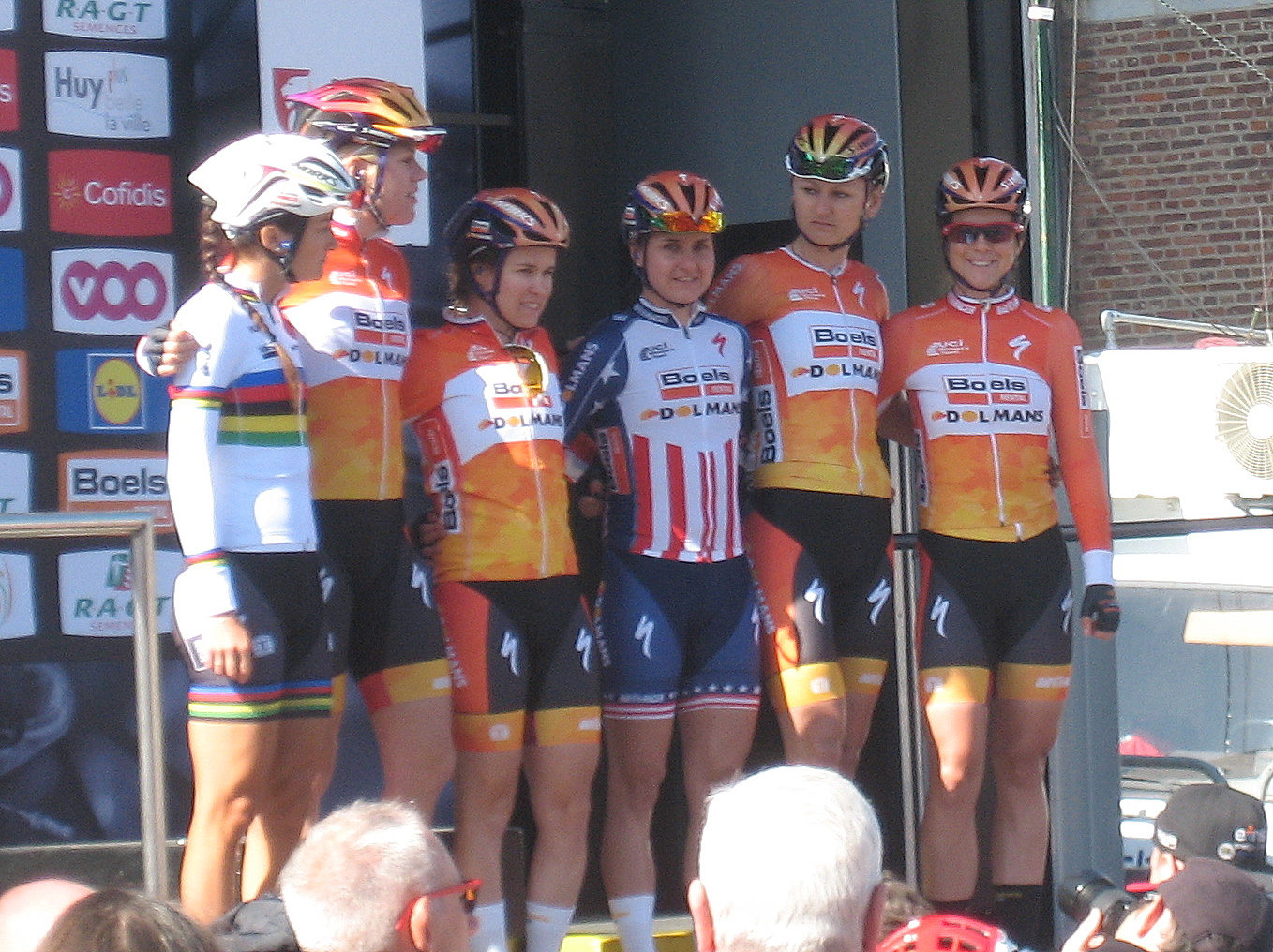 Boels Dolmans voor start Waalse Pijl 2016